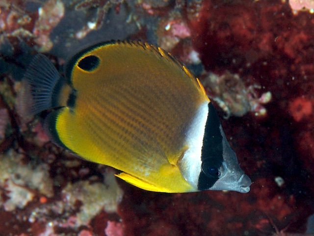 チョウチョウウオ Chaetodon auripes